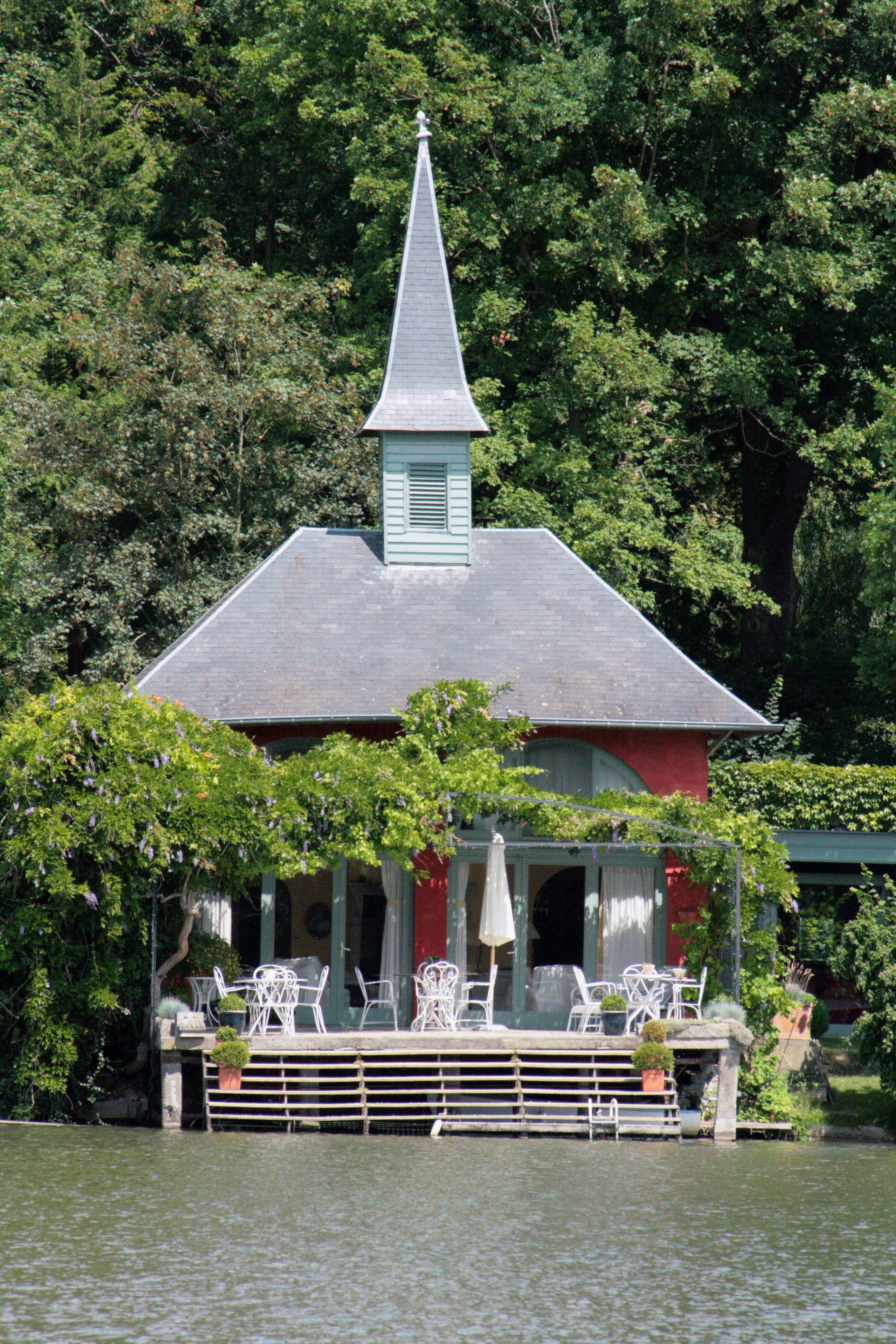 Lac de Genval, (Rixensart et Overijse), Belgique. Chapelle de Guillaume Tell